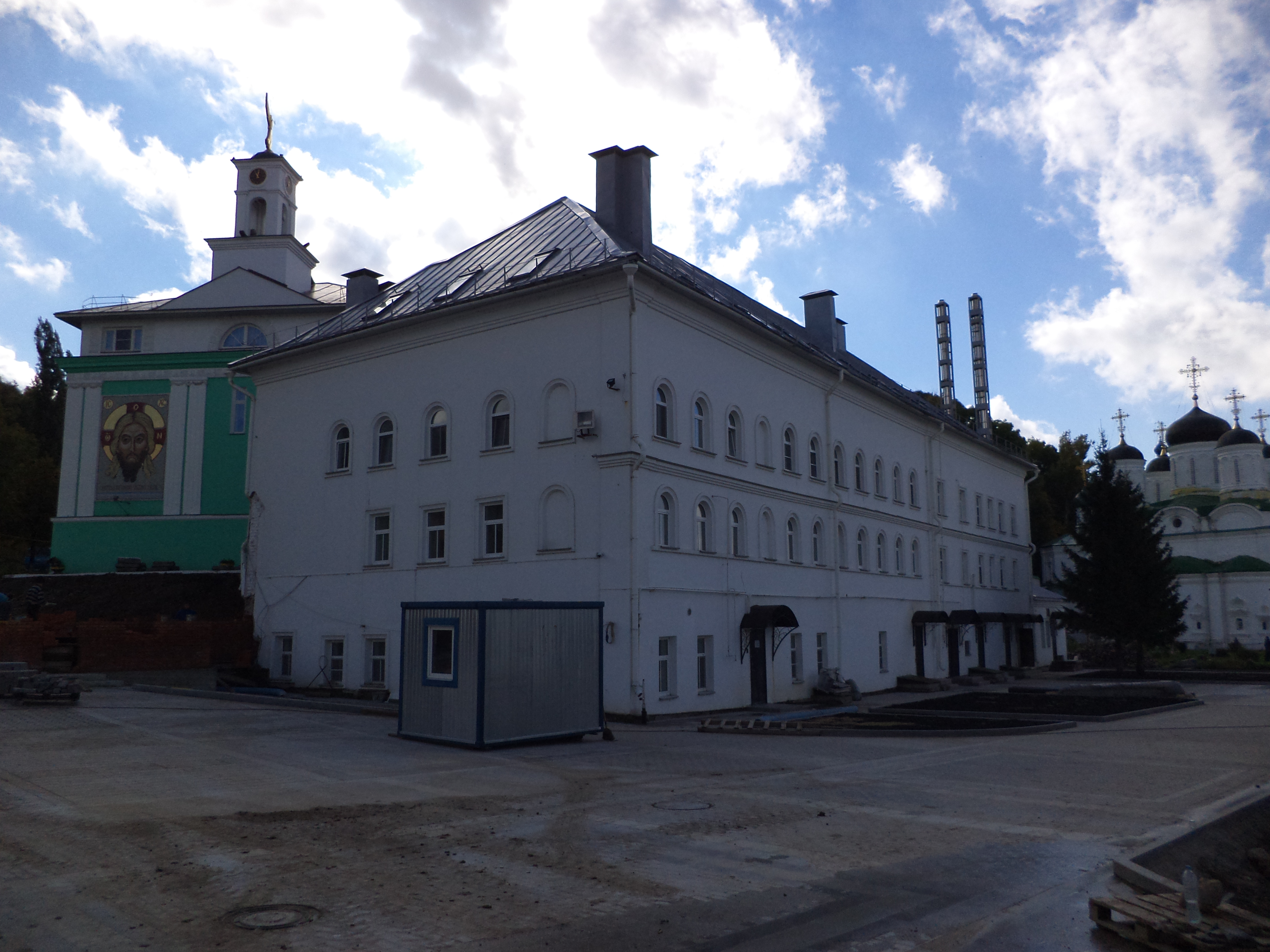 Корпус келий юго-восточный: переулок Мельничный, 8, 10, 12, 14, Похвалинский съезд, 5, Нижний Новгород, Нижегородская область